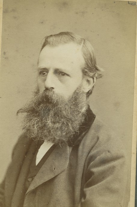 Frederik Cornelis Tromp, minister van Marine, echtgenoot van Augusta Elise Tromp-van der Mandele van de familie Prins, villa "Prinsenhof", Dorpsstraat, Bennekom. Geboren 1827, overleden 1900.